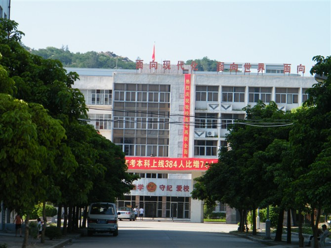 在达濠华侨中学大门前校道上望侨中正门 20019.7.31